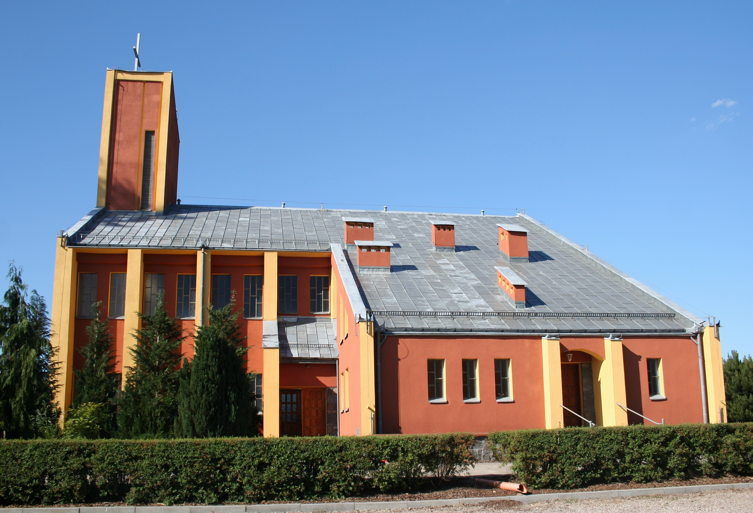 Kościół św. Jozefa w Mokrem, gmina Czersk